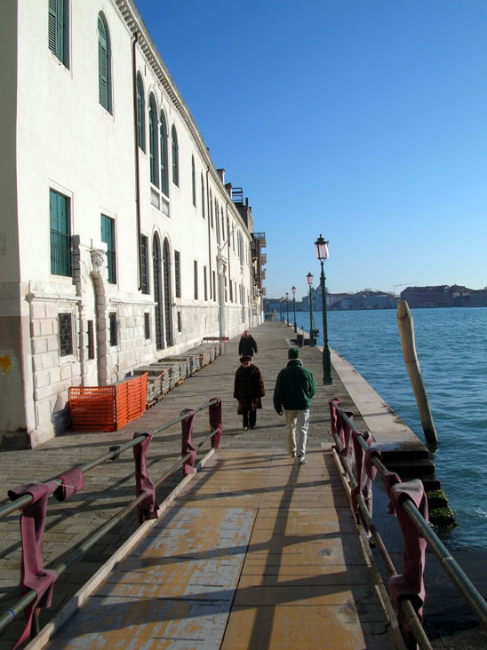 La passeggiata delle "Zattere" a Venezia, all'altezza dello Spirito Santo.